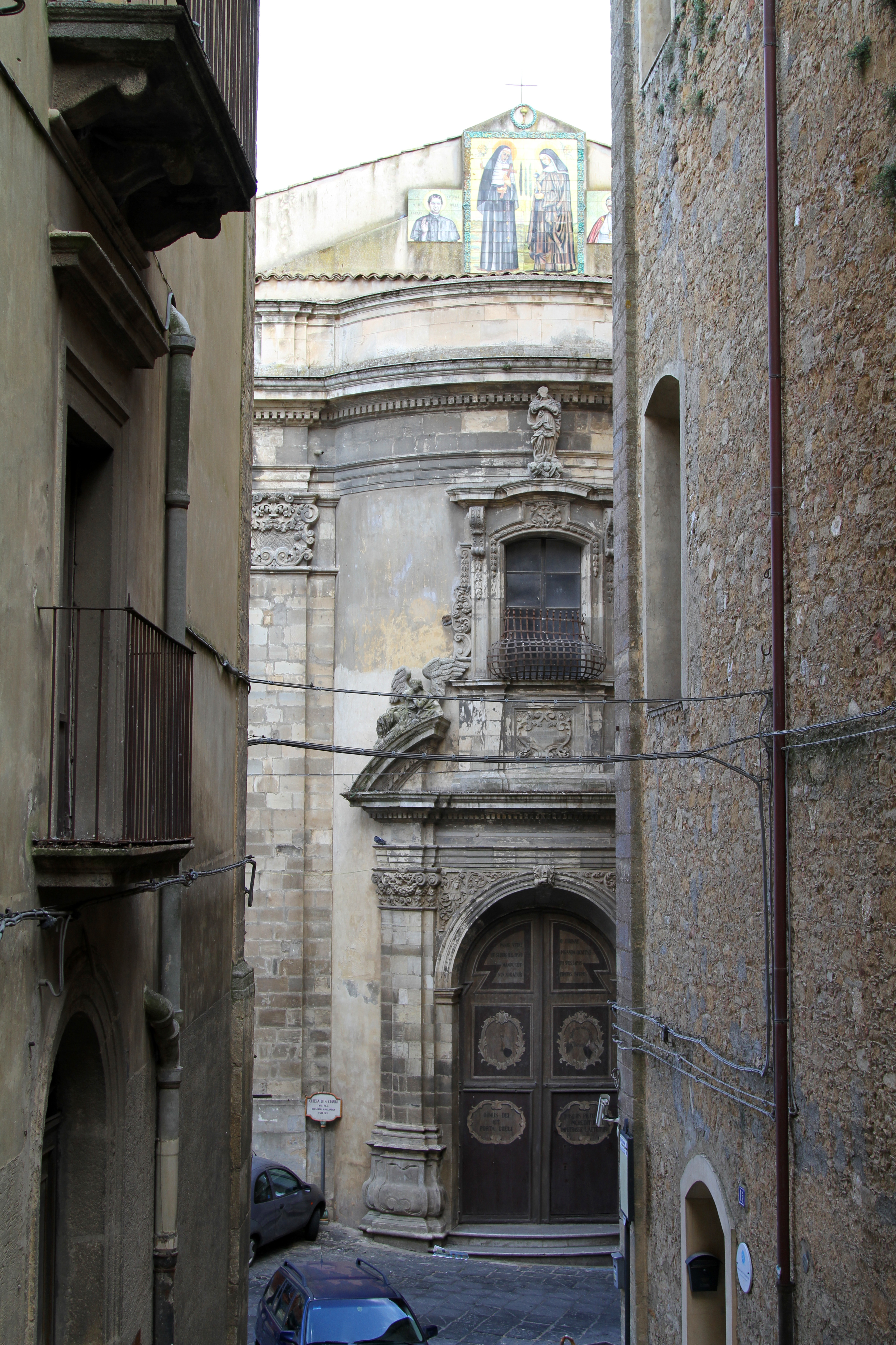 Caltagirone: via Purgatorio